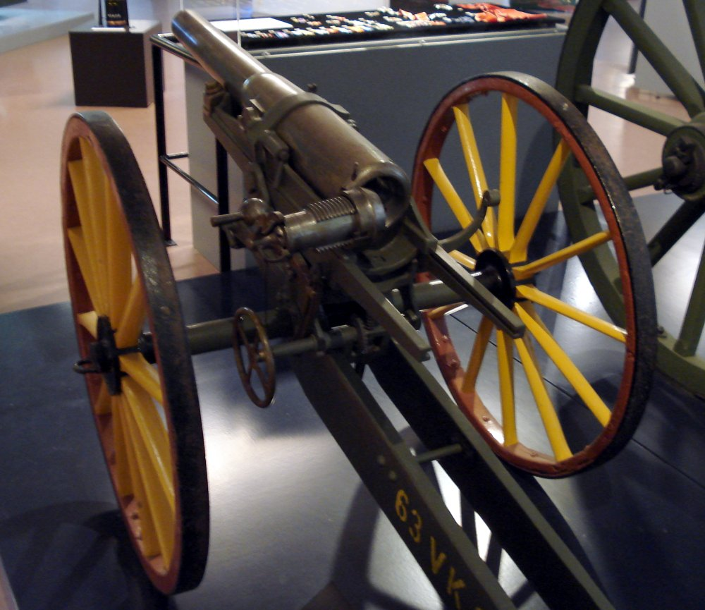 63 mm Baranovsky gun